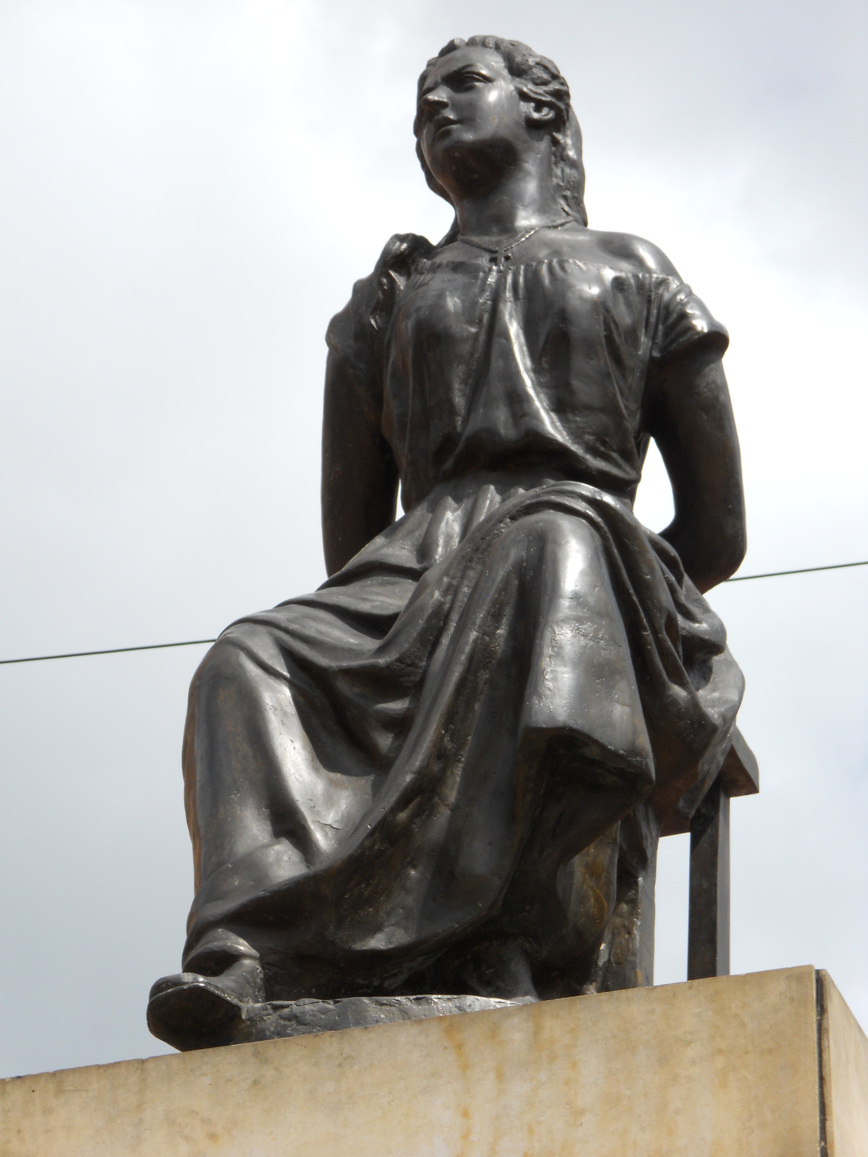 Monumento a La Pola en la carrera 2 A con calle 18 barrio Las Aguas, en el centro de Bogotá.